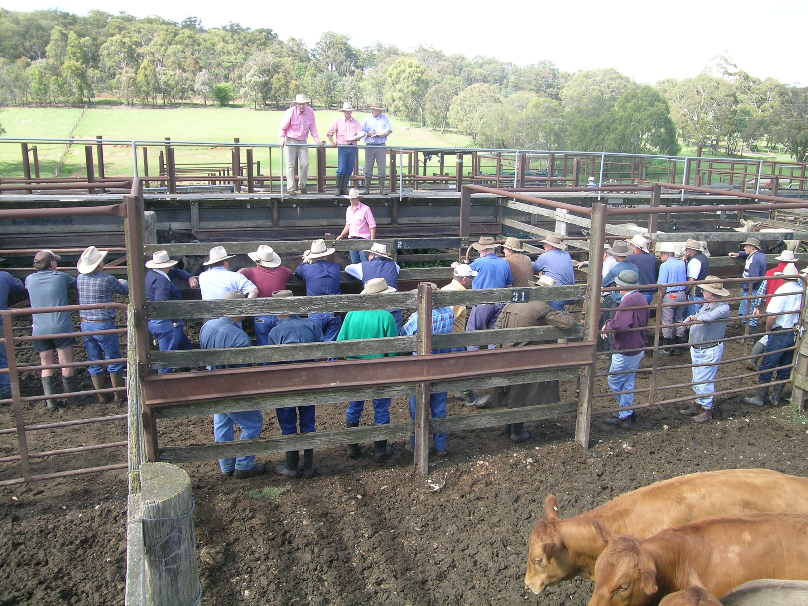 Cattle sale, Walcha, NSW